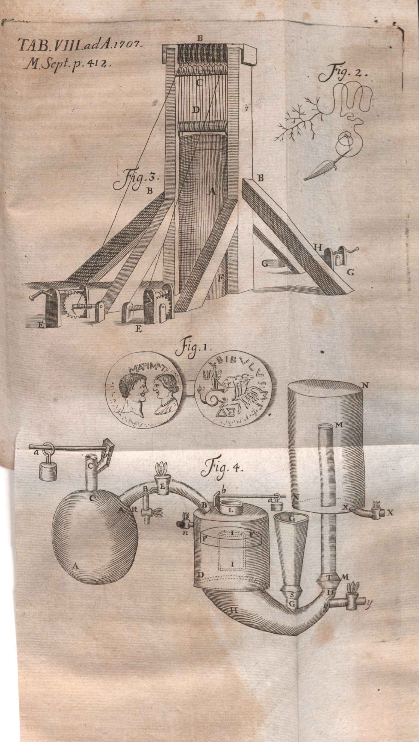 Illustration